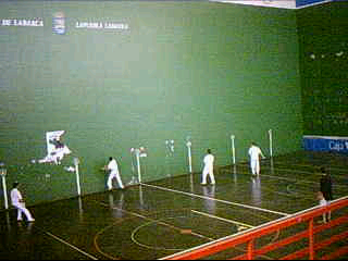 Partido de pelotamano. Foto de --Biohazard910. Categoría: Deporte (imagen)